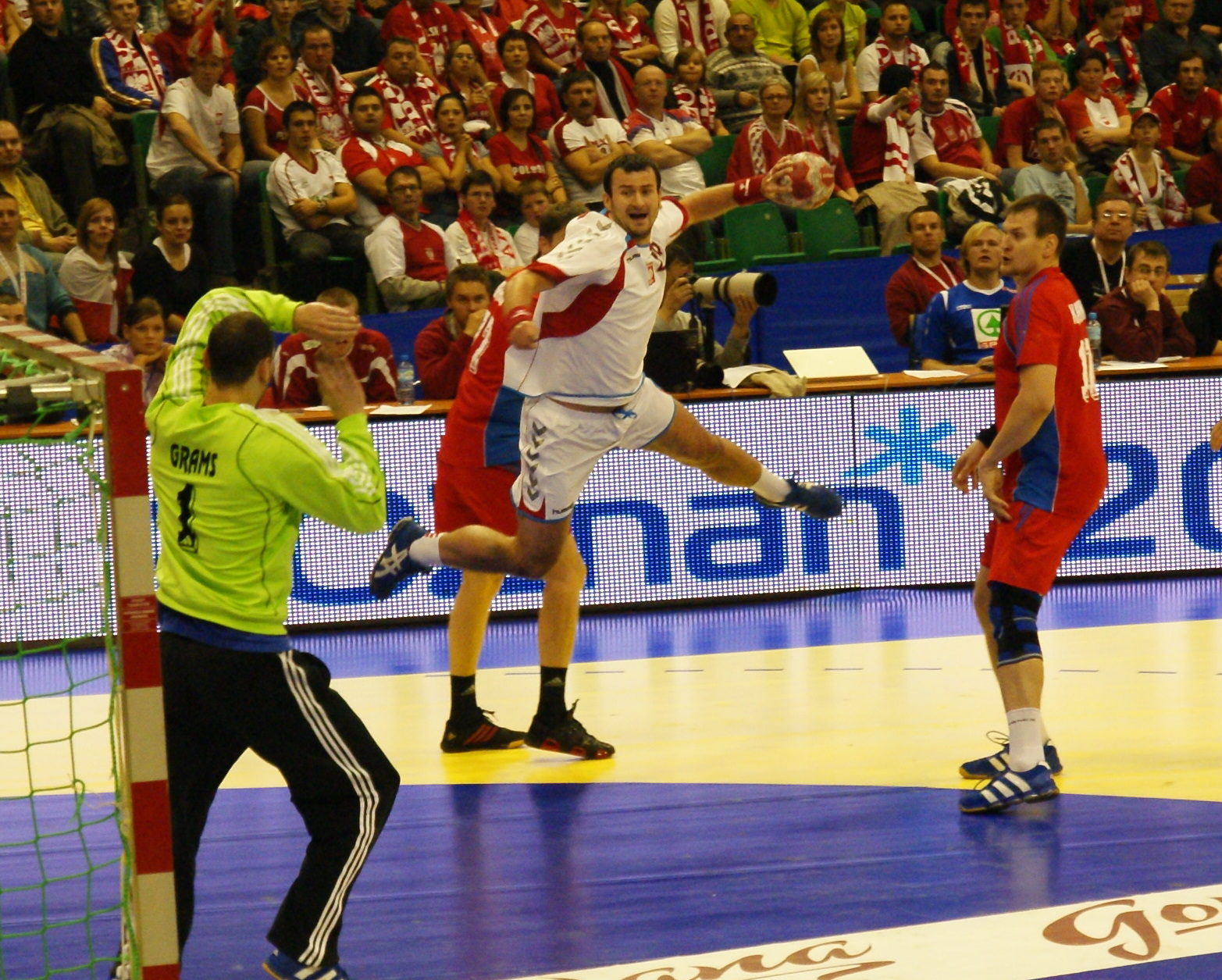 Paweł Piwko Mecz Polska - Rosja, Turniej Reprezentacji Narodowych Mężczyzn w Piłce Ręcznej, Hala widowiskowo-sportowa Arena, Poznań, Polska.